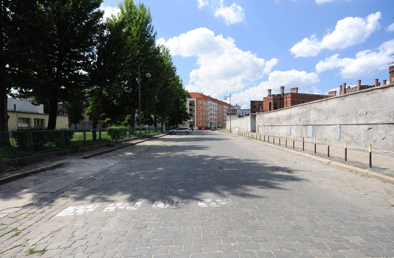 Ulica Świebodzka widziana od ulicy Muzealnej.